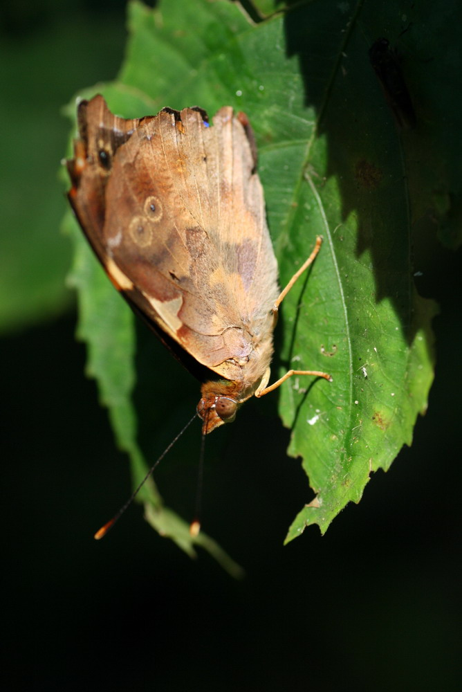 Tingo-Maria. Peru. Aug. 2008